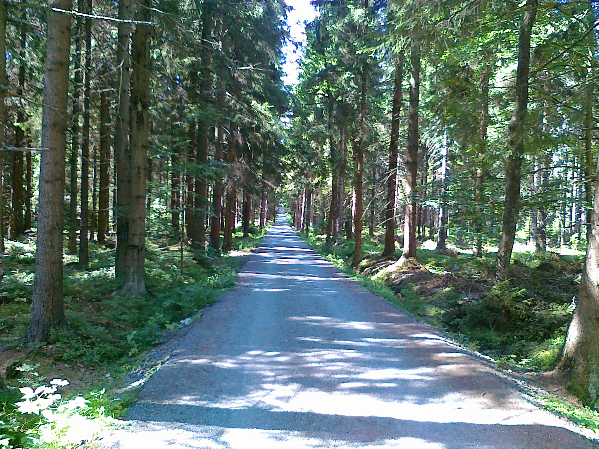 Widok na punkt siodłowy przełęczy Skřítek